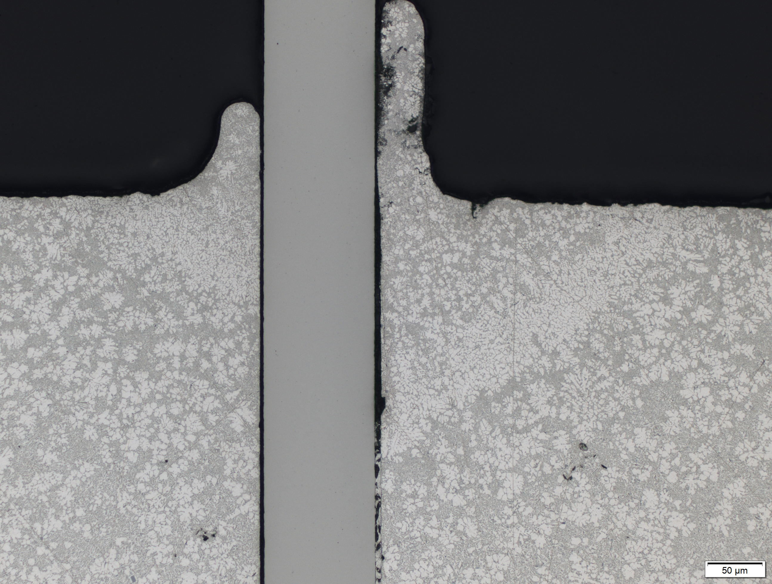 Braun Sixtant SM3 Schaubild Kamineffekt geätzter Schliff eingebettete Klinge in Aluminium